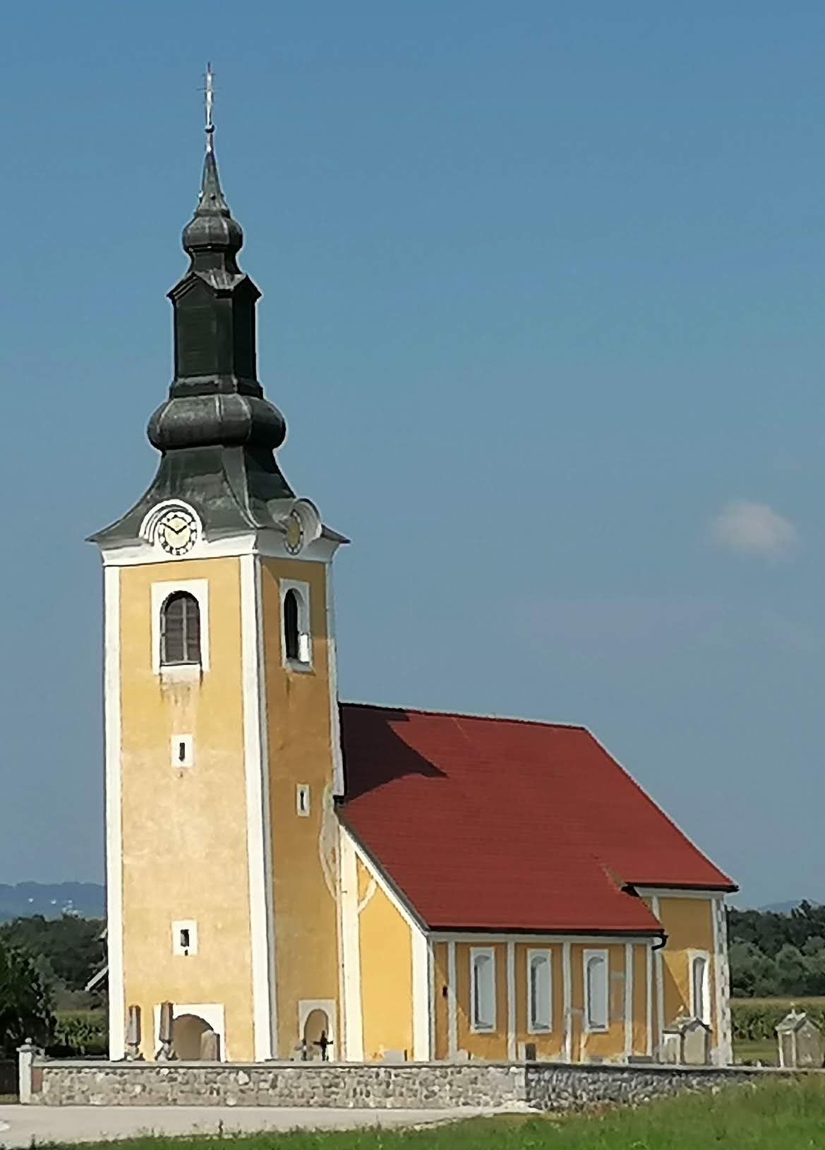 Cerkev sv. Nikolaja, Drama, Šentjernej, Slovenija, (Otok pri Dobravi, Dobravski otok, Gotno brdo) This media shows a cultural heritage object of Slovenia with the EŠD number: 2504